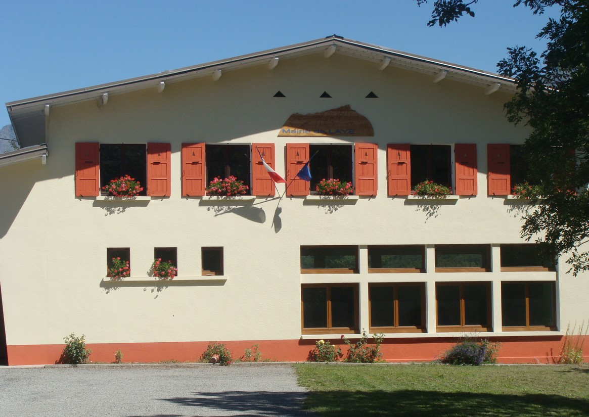 La mairie de Laye, à Brutinel, récemment rénovée.